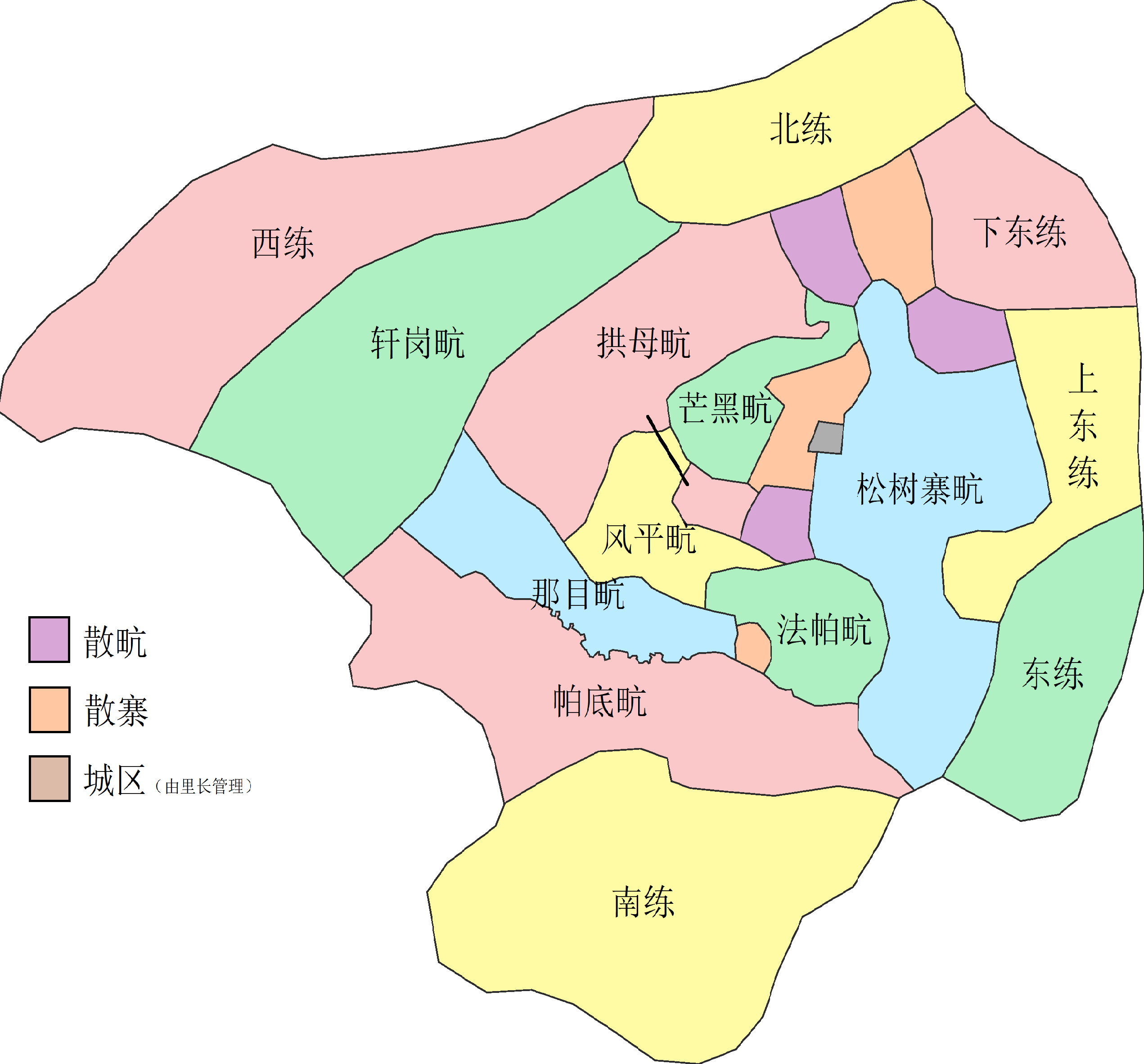 中文（中国大陆）: 芒市土司行政区划